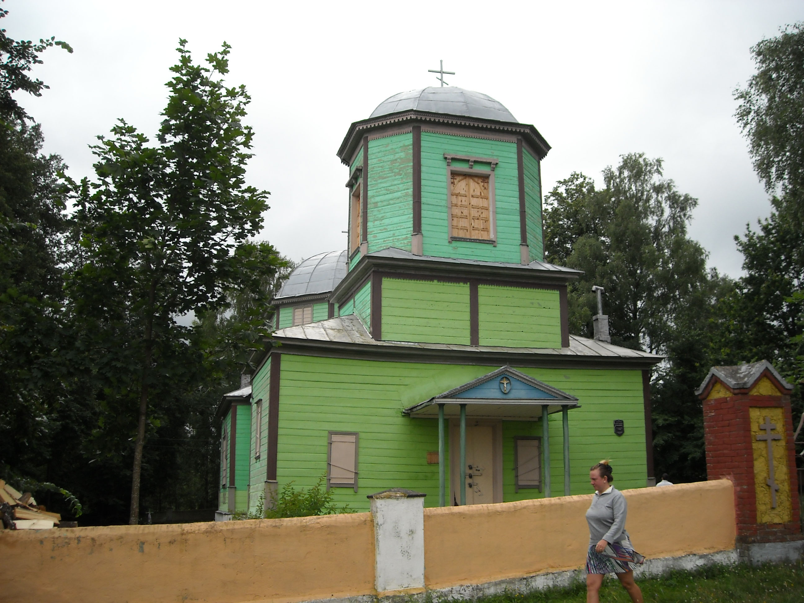 Беларуская (тарашкевіца): Казьмадзям’янаўская царква. в. Гарадок This is a photo of Belarusian heritage monument. Reference number: 513Г000408 ( WLM)